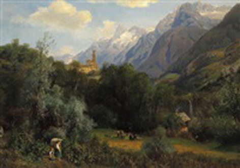 Weinernte in Südtirol mit Blick auf eine Burg, Eduard Schoenfeld (* 24. Mai 1839 in Düsseldorf; † 27. November 1885 ebenda) war ein deutscher Maler